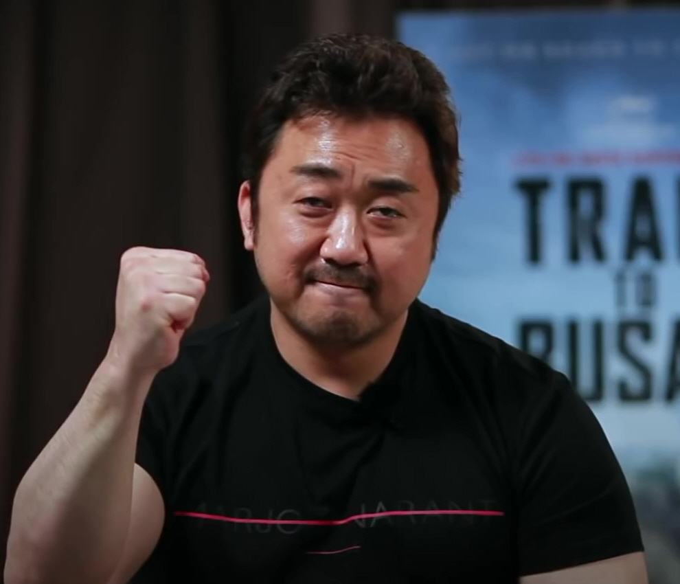 (부산행) 칸 국제 영화제 초청 배우 감사인사 영상 1m4s